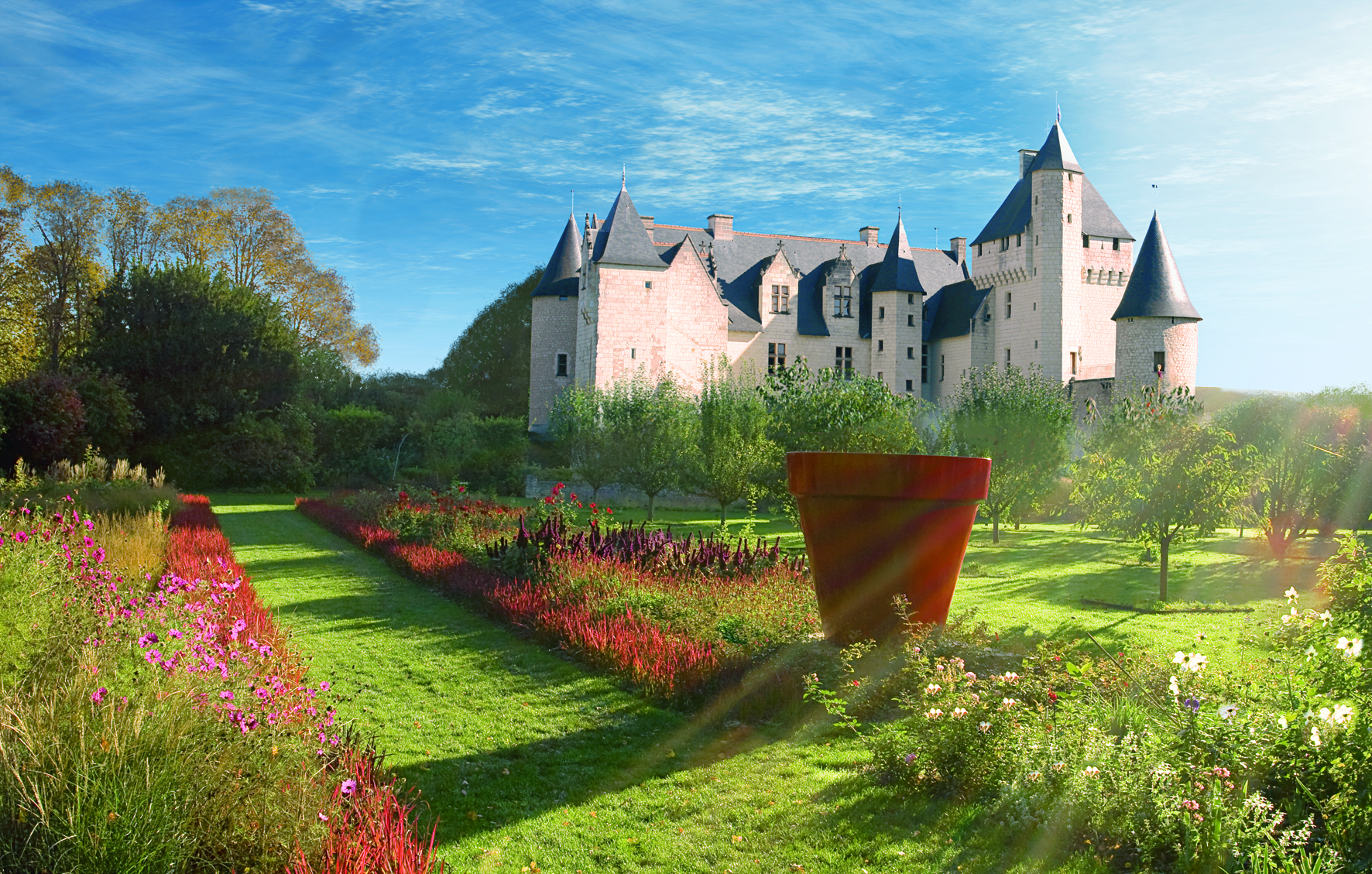 ©chateauduRivau